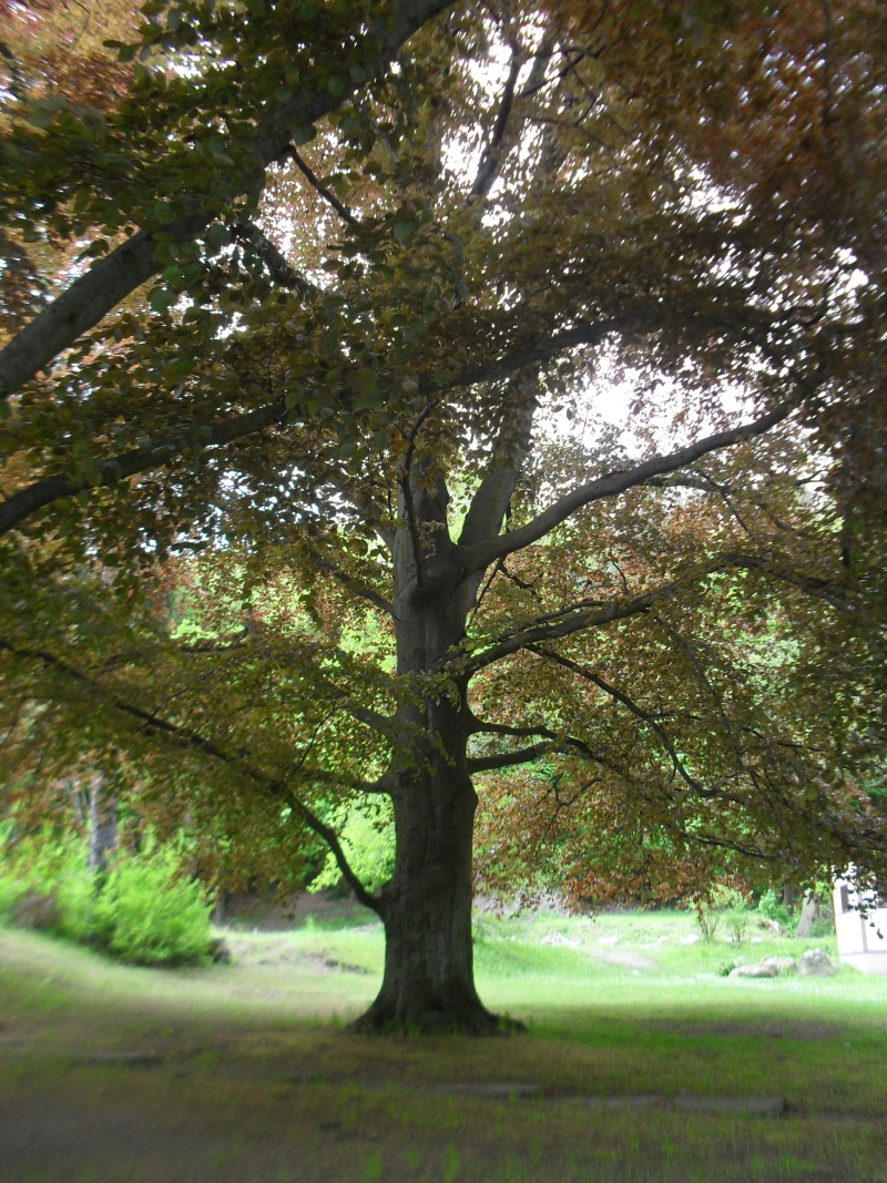 583. 2 buki zwyczajne odm. czerwonolistnej - pomniki przyrody -ul. Czyżewskiego 29-31 – zespół dworsko-parkowy Ludofino